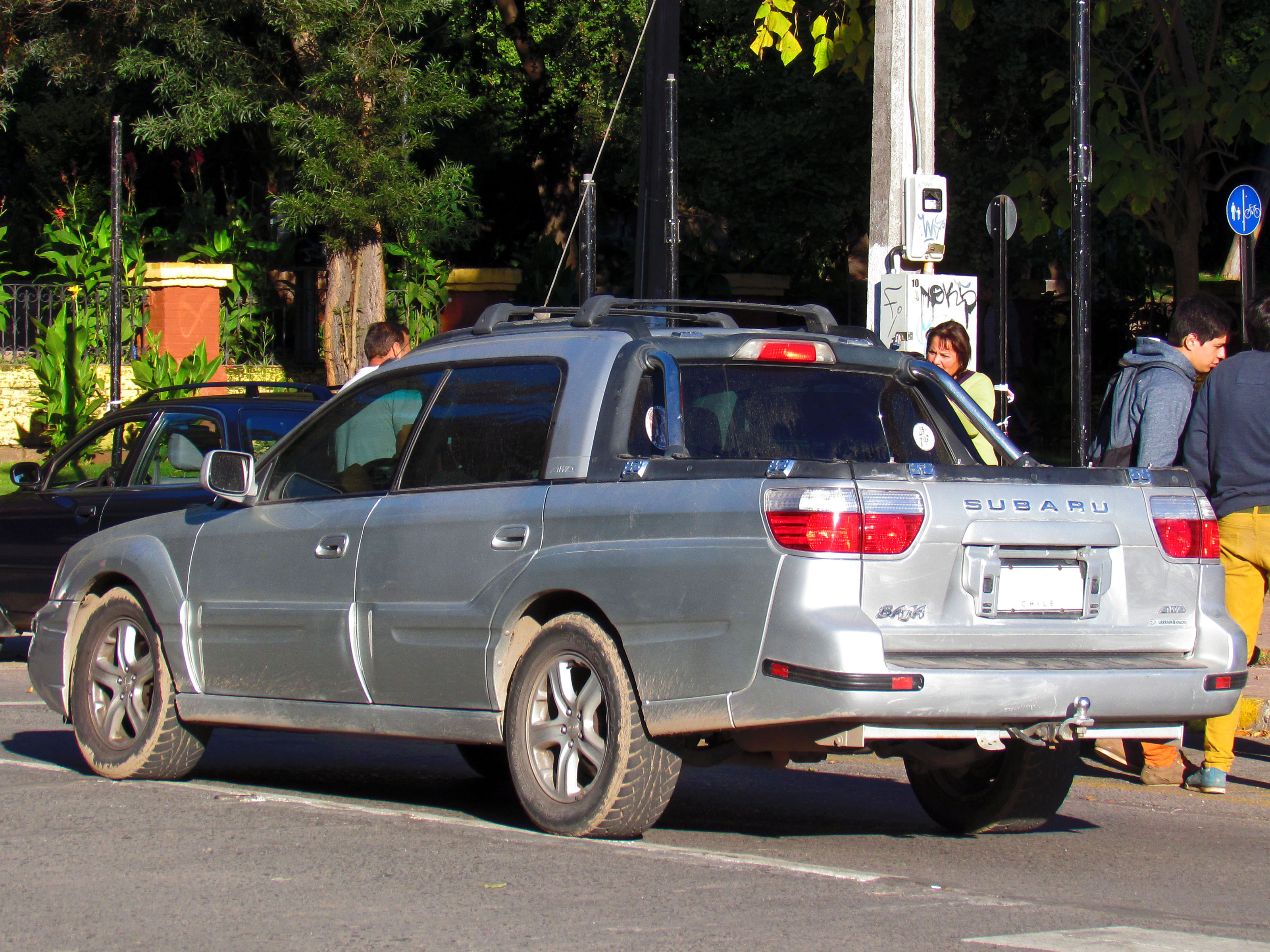 Subaru Baja 2.5 2003